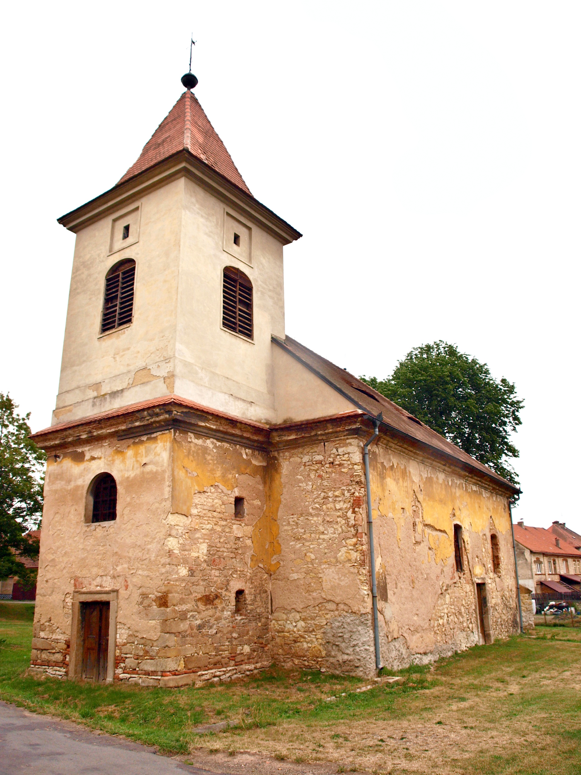 Nesuchyně